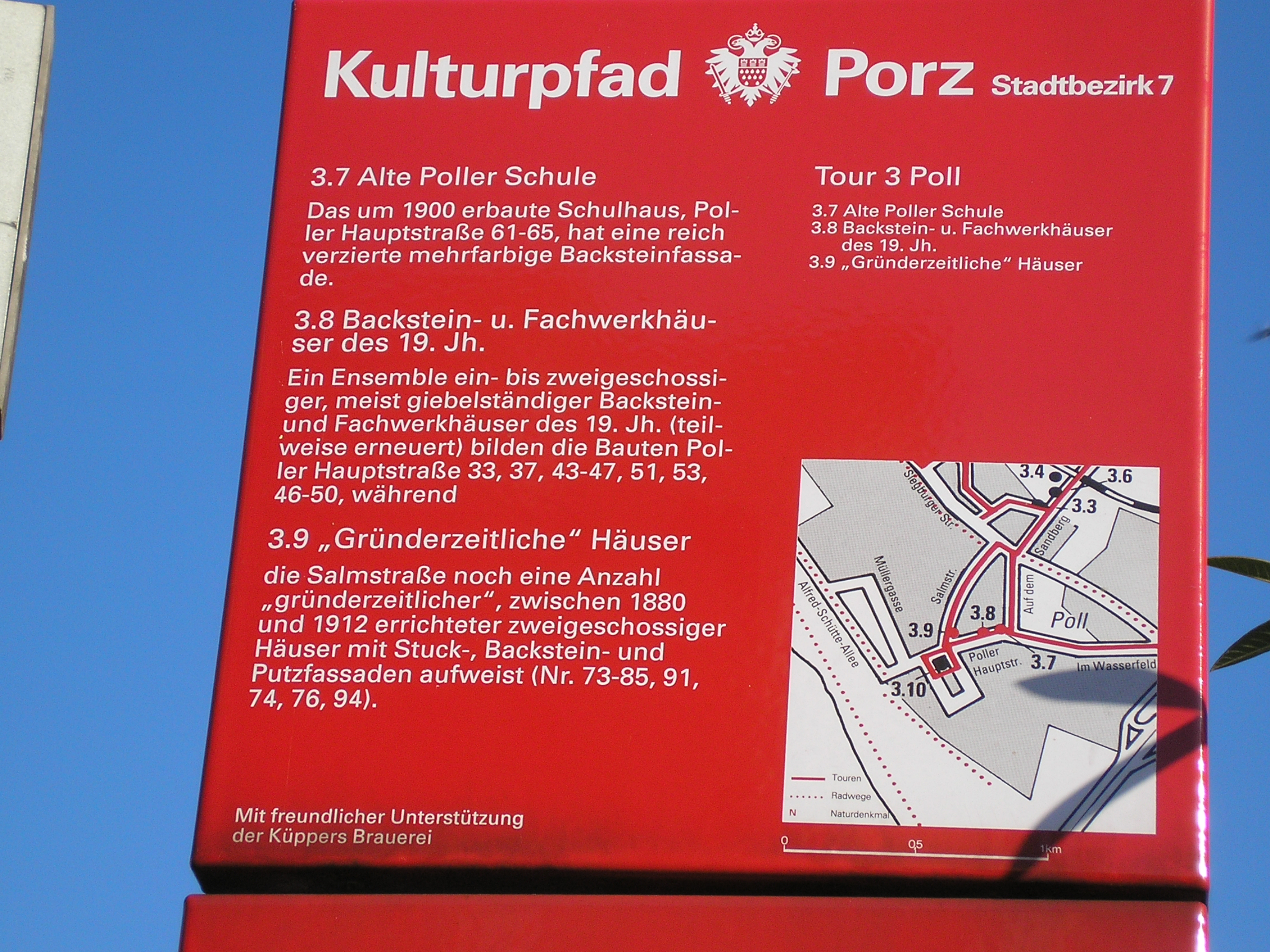 Kulturpfad Porz, Köln-Poll, Abschnitt 3.7, 3.8, 3.9 Gebäude in Poll